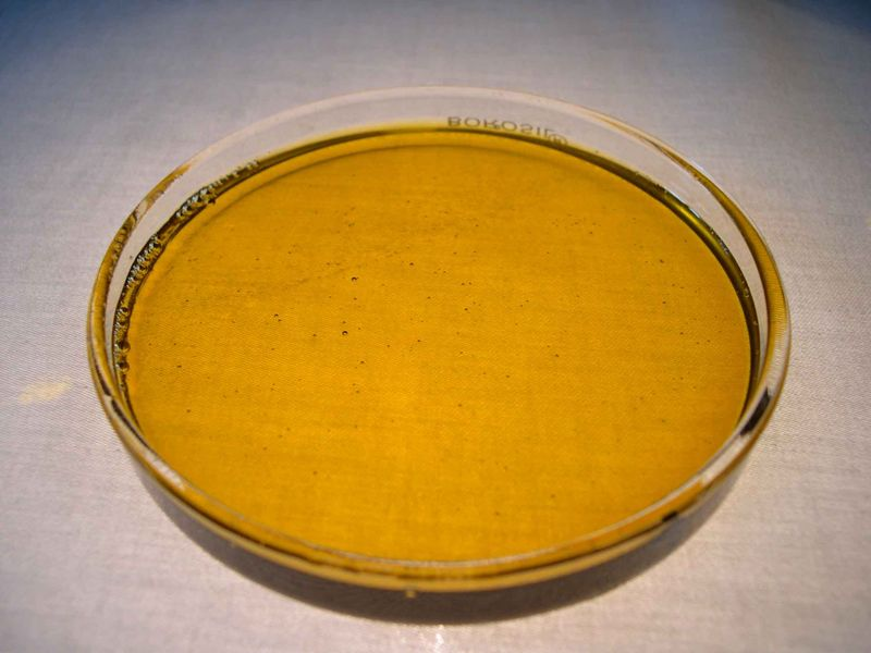 Neem Expeller Oil